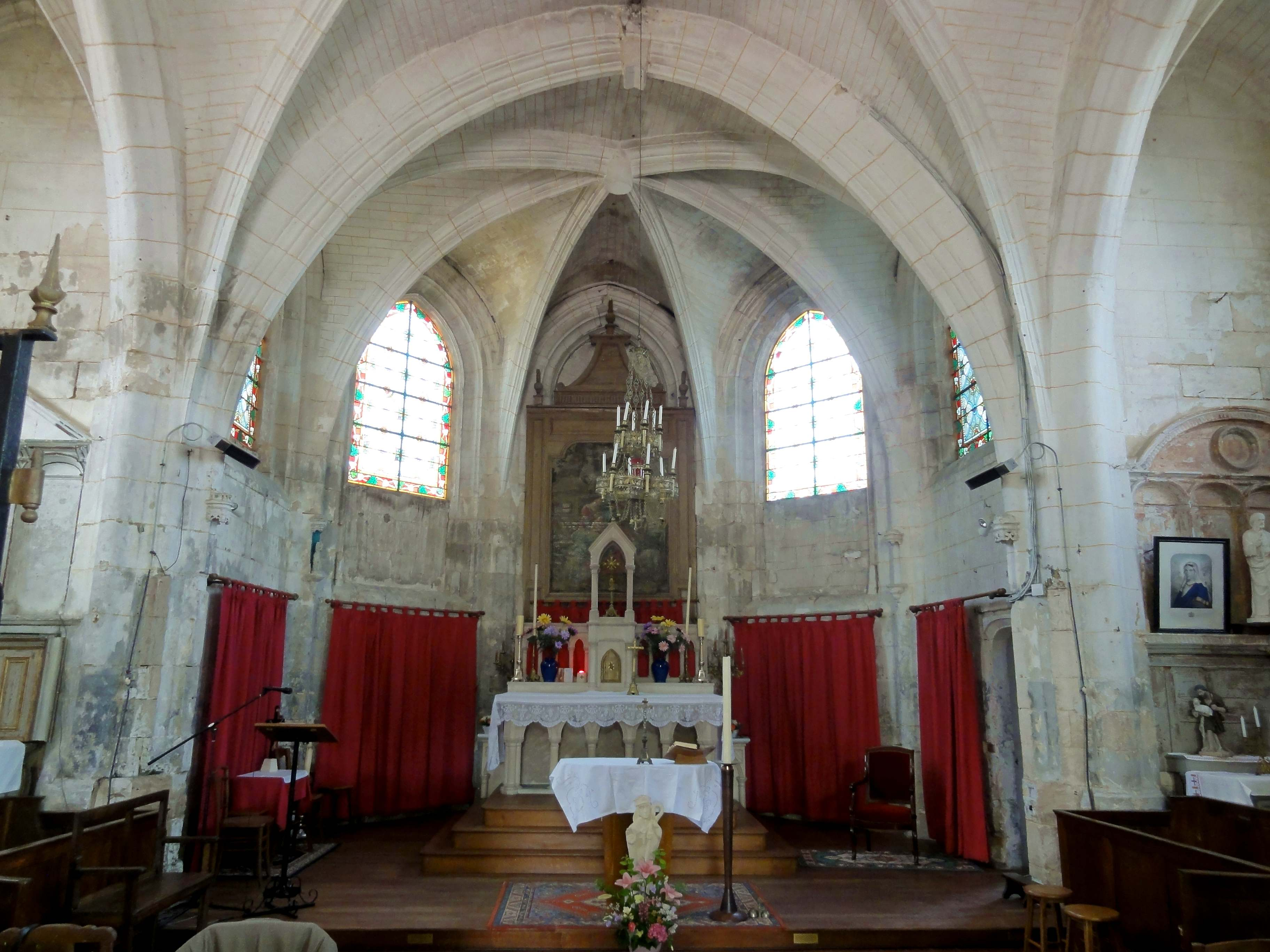 Intérieur de l'église Saint-Wandrille de Rivecourt (voir titre).